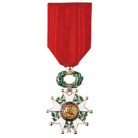 Description Croix de chevalier de la Légion d'honneur. Au grand-oncle de m. fantassin 72 Date1918Sourcemédaille personnelle le (col.Brébant)AuthorLa monnaie de Paris.Permission (Reusing this file) libre de droits Croix de chevalier de la Légion d'honneur. Au grand-oncle de m. fantassin 72